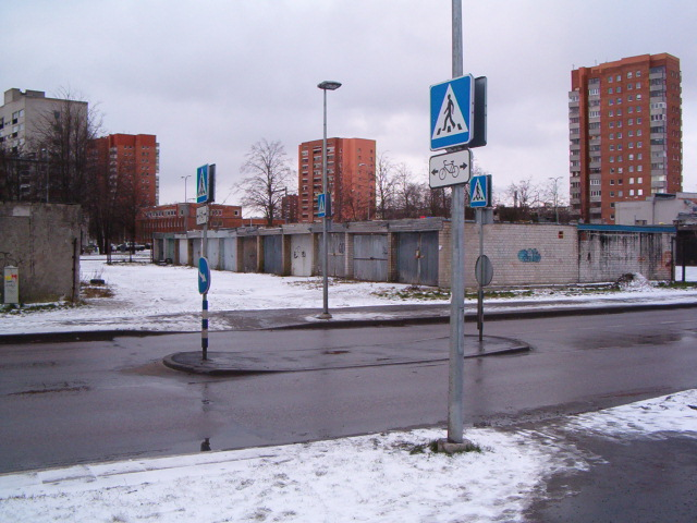 Garaažid Tammsaare tee ääres. Laki I kvartal (Kadaka asum). Tallinn